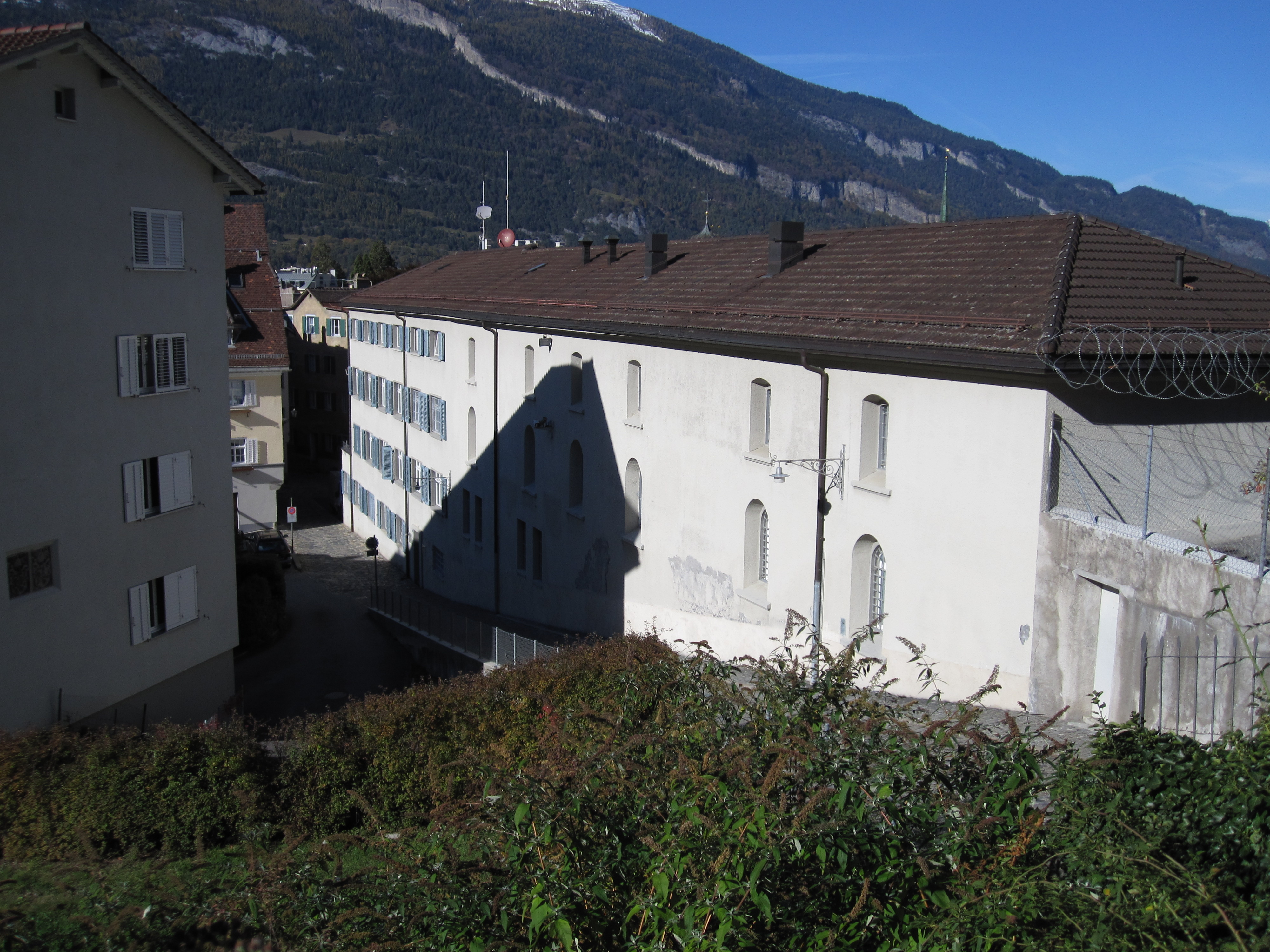 die Justizvollzugsanstalt Sennhof in Chur (Kanton Graubünden, Schweiz)